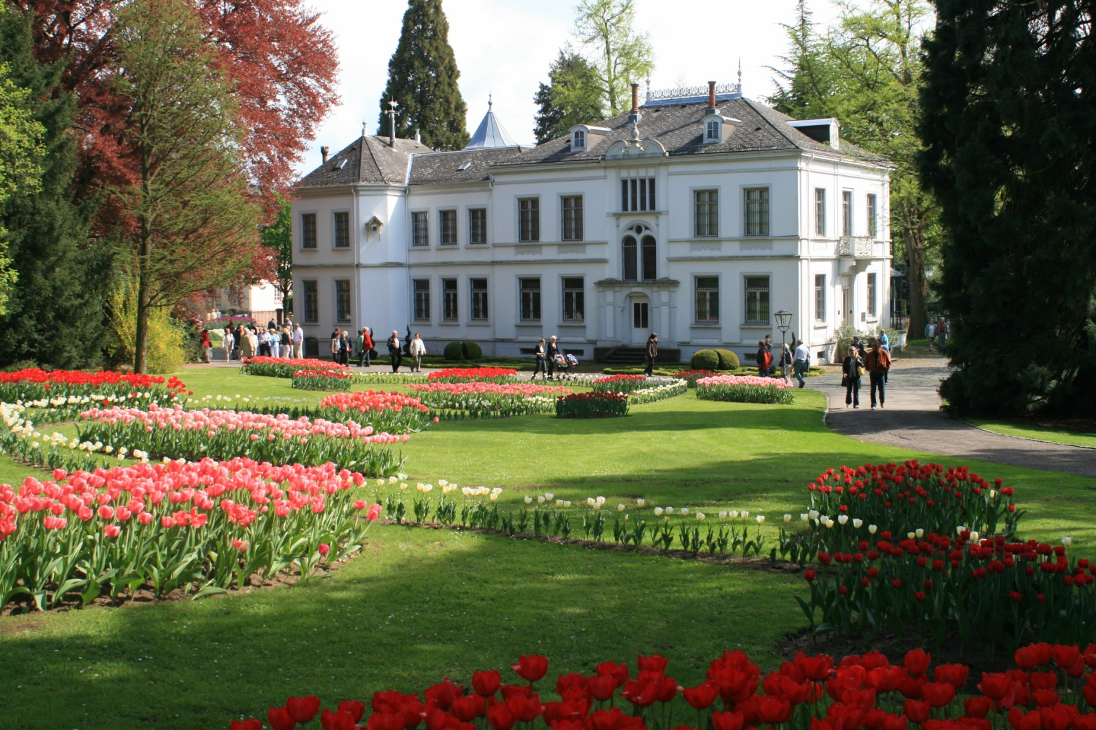 Lahr : villa du parc municipal